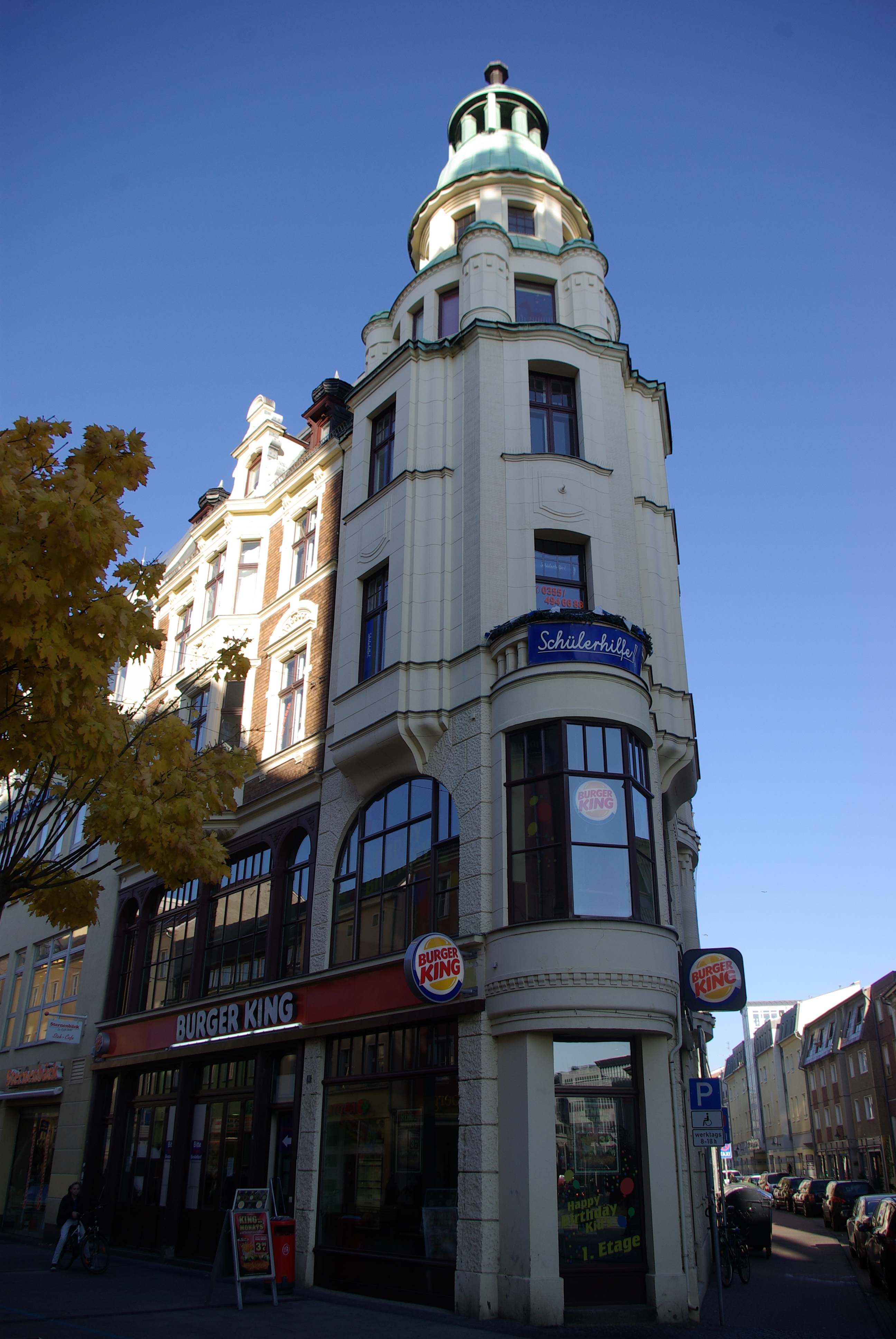 Cottbus in Brandenburg. Das Haus Spremberger Straße 16 steht unter Denkmalschutz. Das Haus steht schräg gegenüber dem Spremberger Turm.